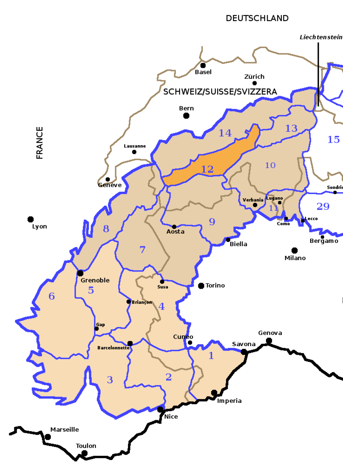 Alpi Occidentali secondo la SOIUSA con evidenziate le Alpi Bernesi